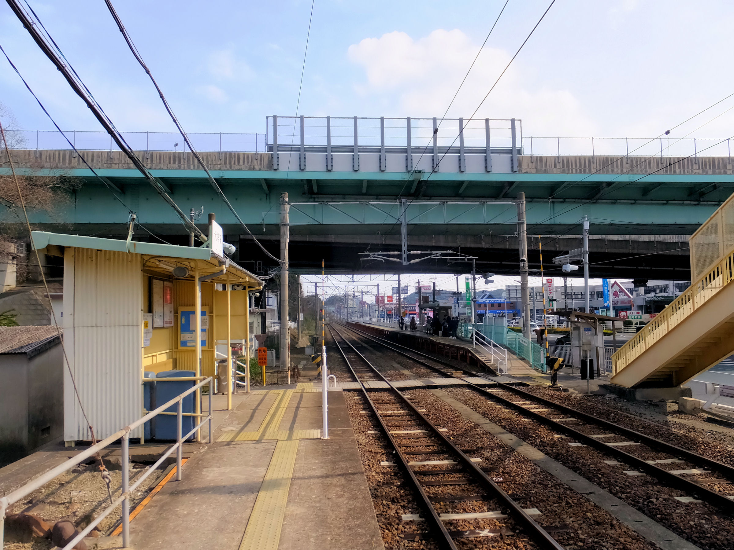 JR九州大塔駅